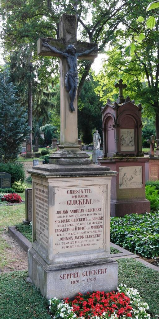 Grab des Büttenredners Seppel Glückert, 1891-1955, auf dem Hauptfriedhof Mainz